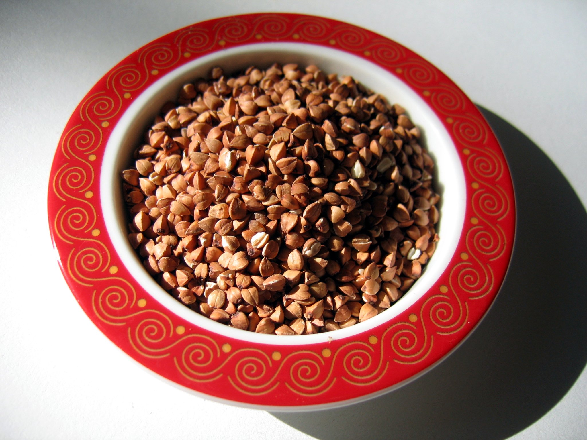 Miska kaszy gryczanej prażonej.